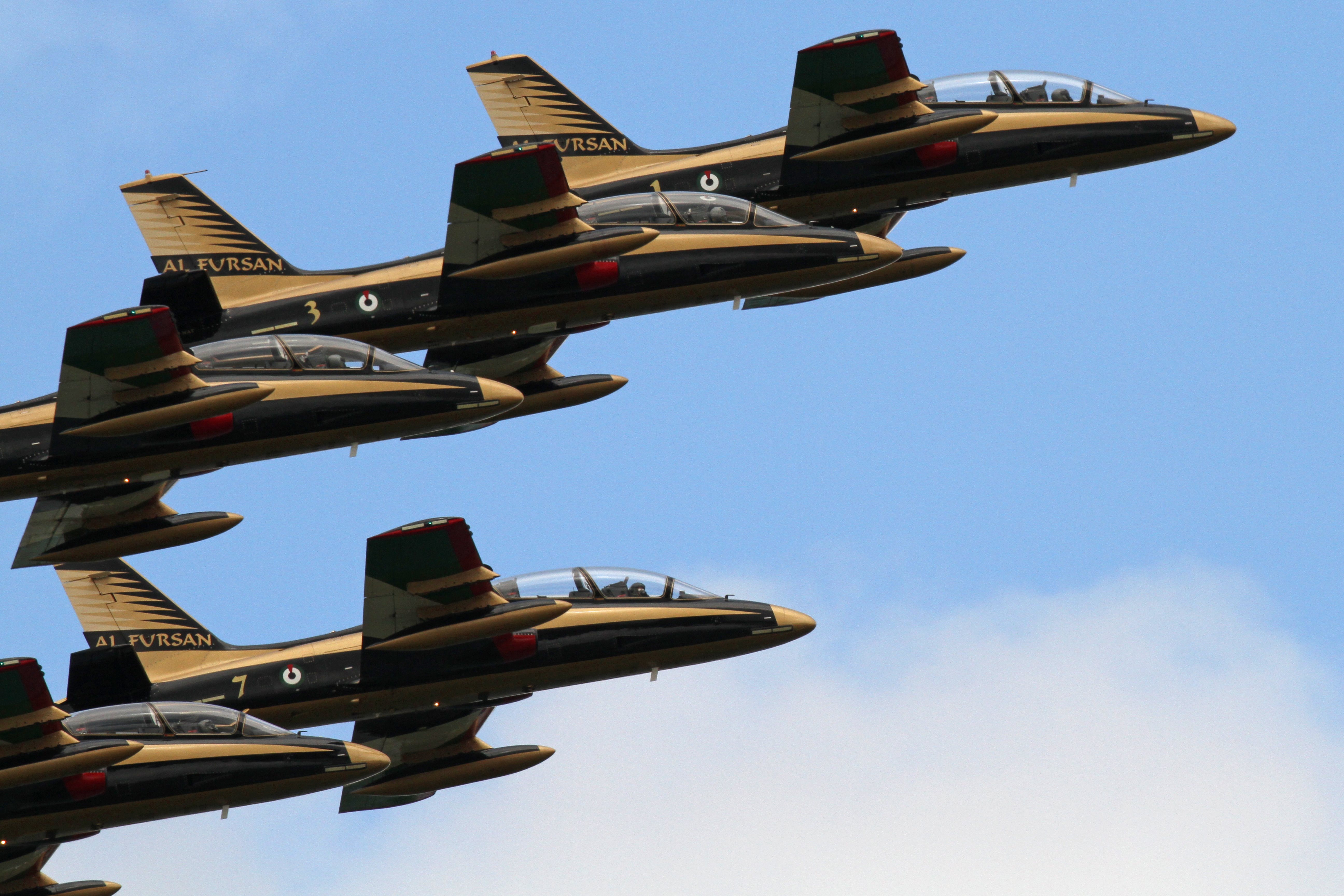 Al Fursan 5